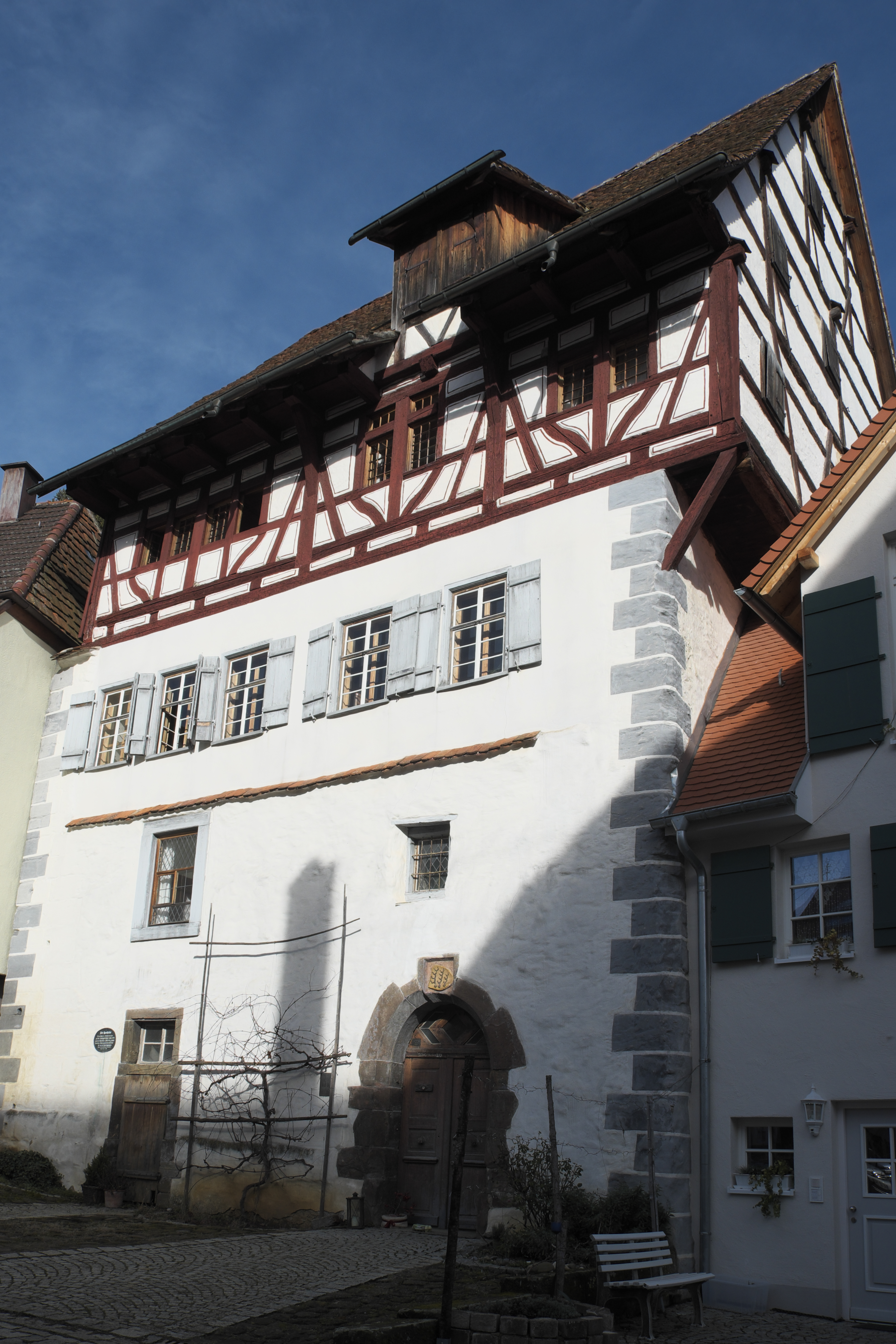 Alte Apotheke in Rosenfeld im Zollernalbkreis (Baden-Württemberg/Deutschland)